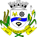 BrasaoPortoAlegreDoTocantins